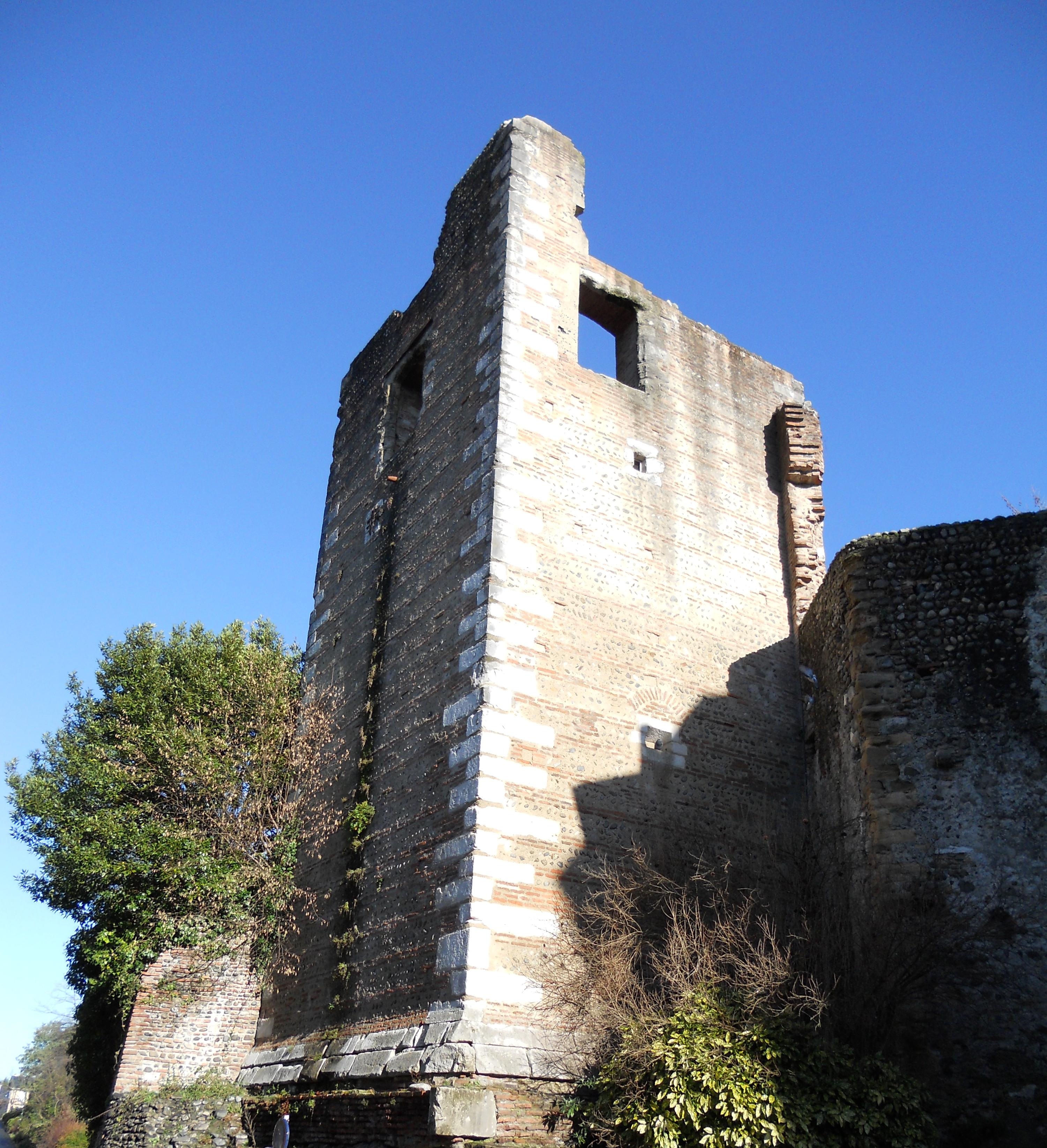 Les vestiges d'une des tours de l'évêché de Lescar